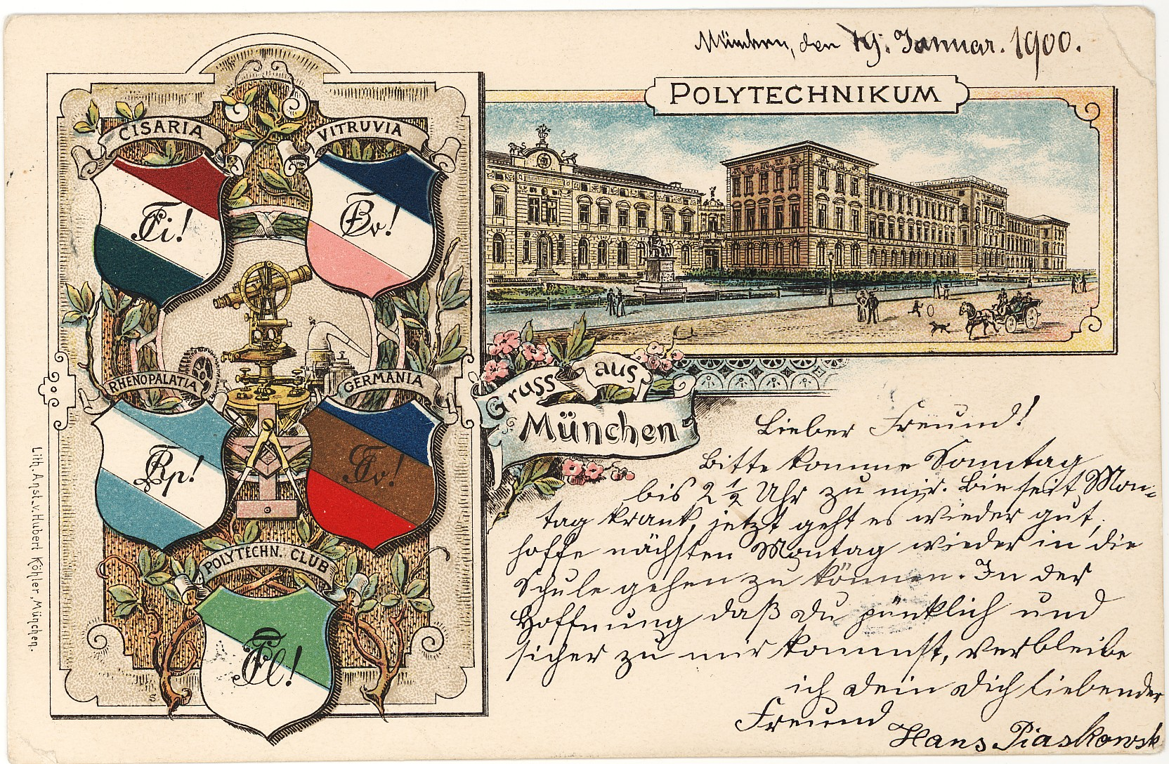 Couleurkarte München Polytechnikum, Text: Lieber Freund! Bitte komme Sonntag bis 2 1/2 Uhr zu mir. Bin seit Montag krank, jetzt geht es wieder gut. Hoffe nächsten Montag wieder in die Schule gehen zu können. In der Hoffnung daß Du pünktlich und sicher zu mir kommst, verbleibe ich Dein Dich liebender Freund Hans Piaskowsk[y]